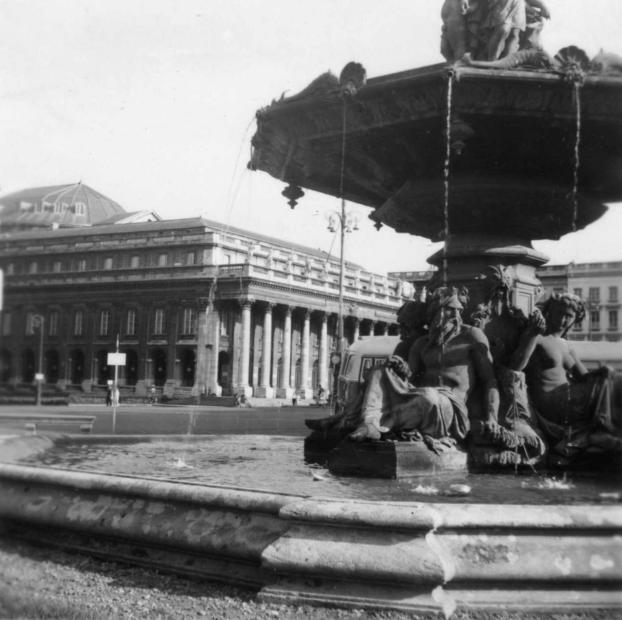 Bordeaux 1958 - Le Grand Théâtre et une des deux fontaines des allées de Tourny, fontaine retirée des allées de Tourny dans les années 1960.